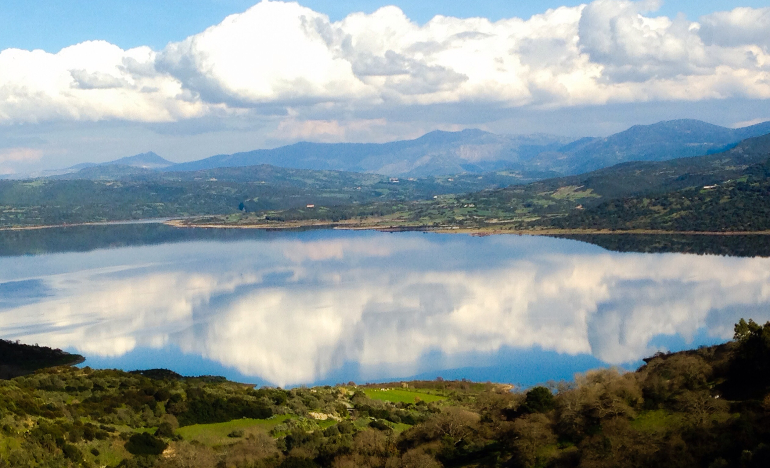 Lago omodeo